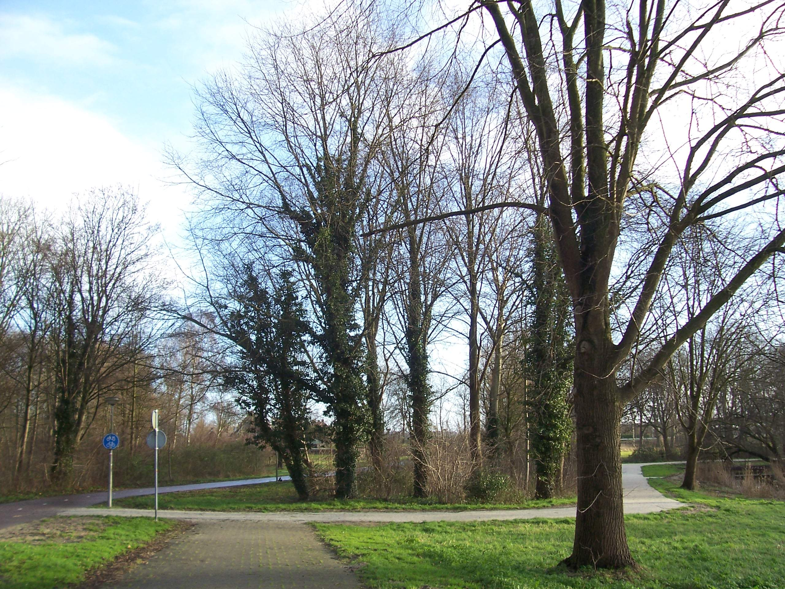 Bijlmeweide met bomen in Amsterdam-Zuidoost, 30 december 2011.